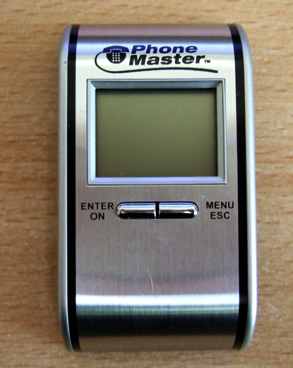 SIM Reader